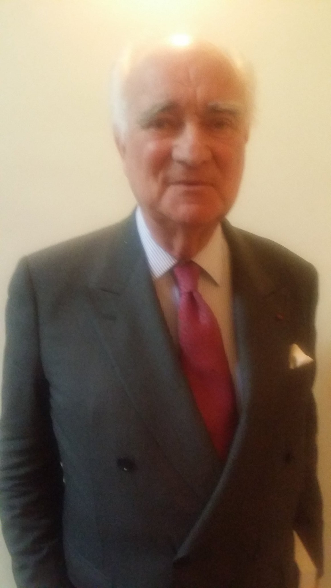 François Bujon de l'Estang